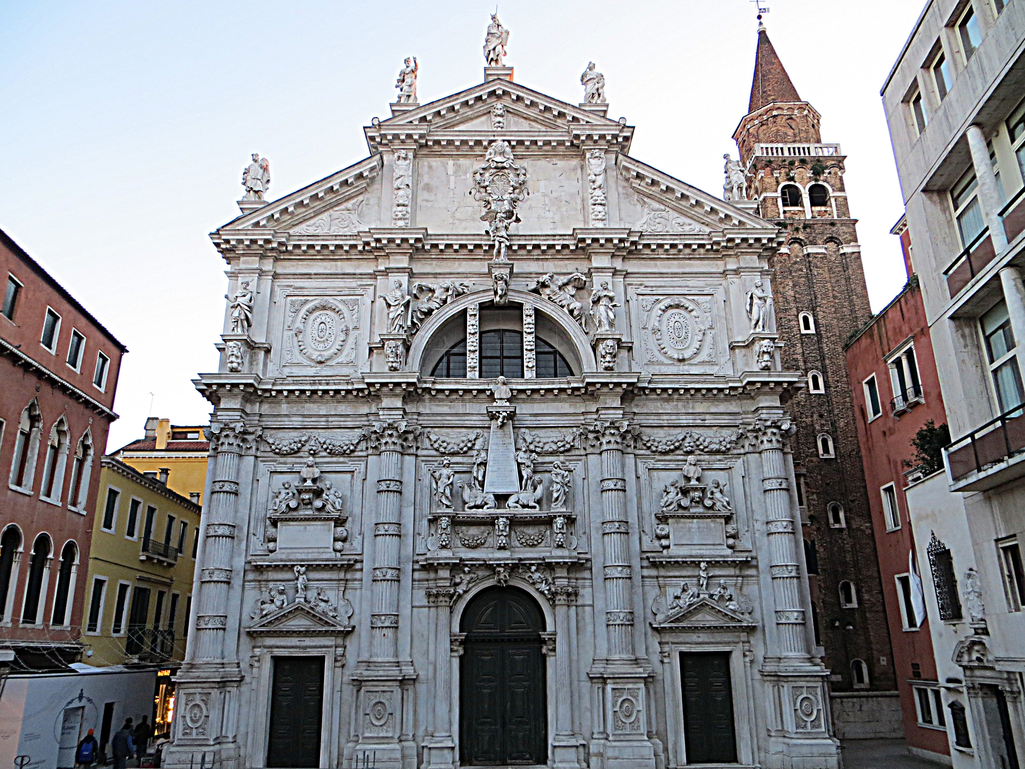 Santa Maria del Giglio